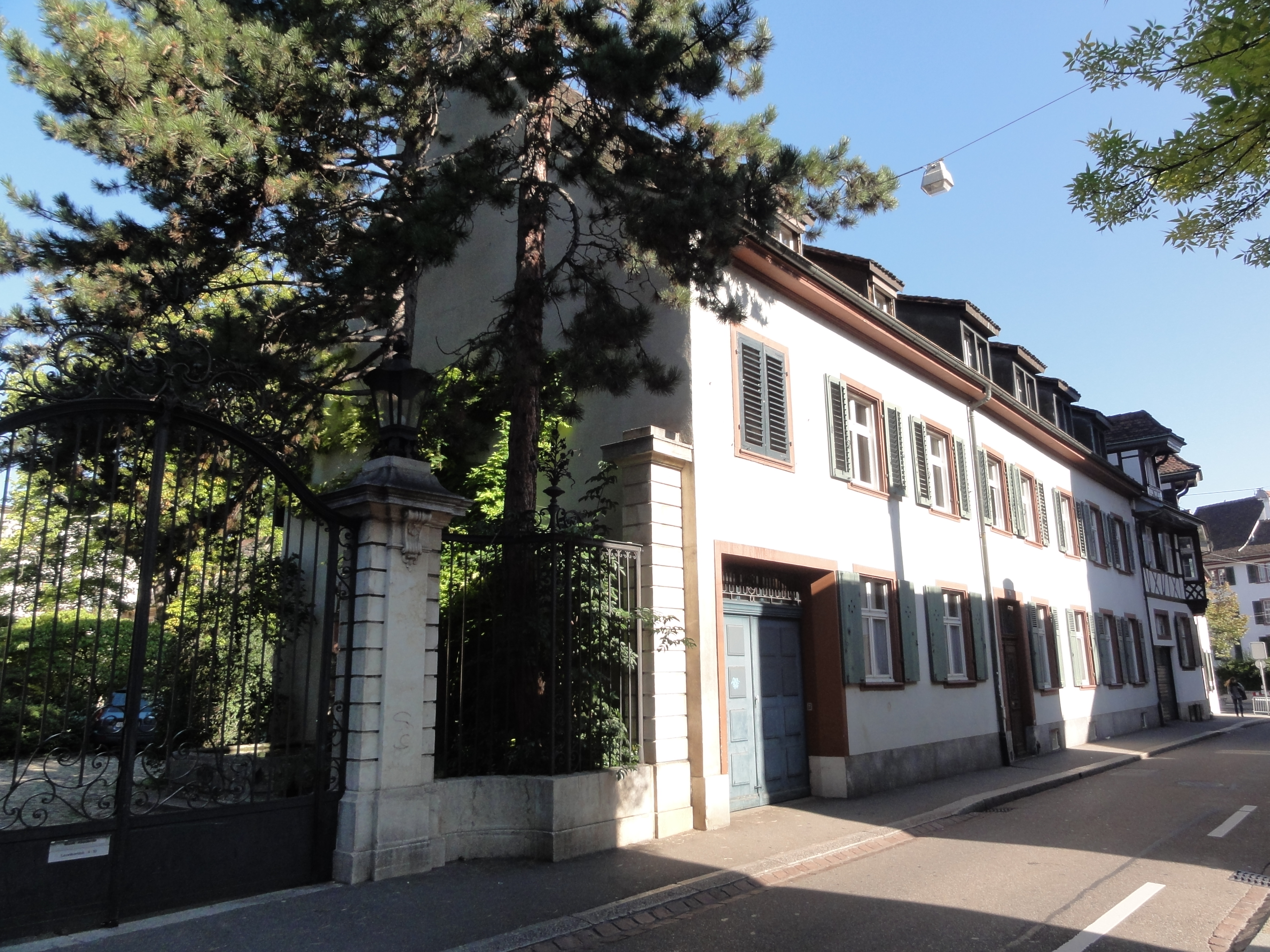 Basel BS — Leonhardsstrasse 6